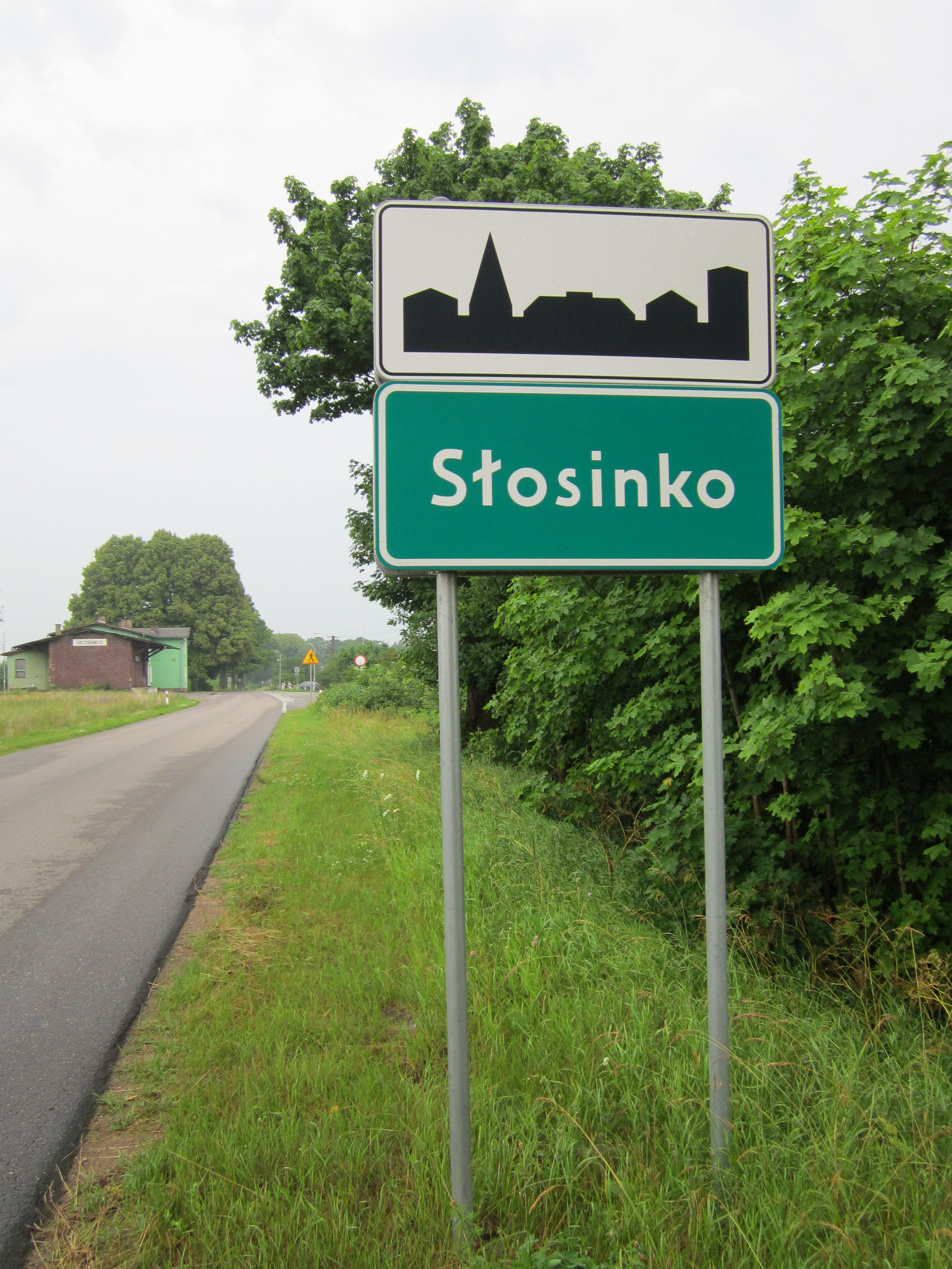 Tablica ta z nazwą miejscowości znajduje się od strony Łękini.